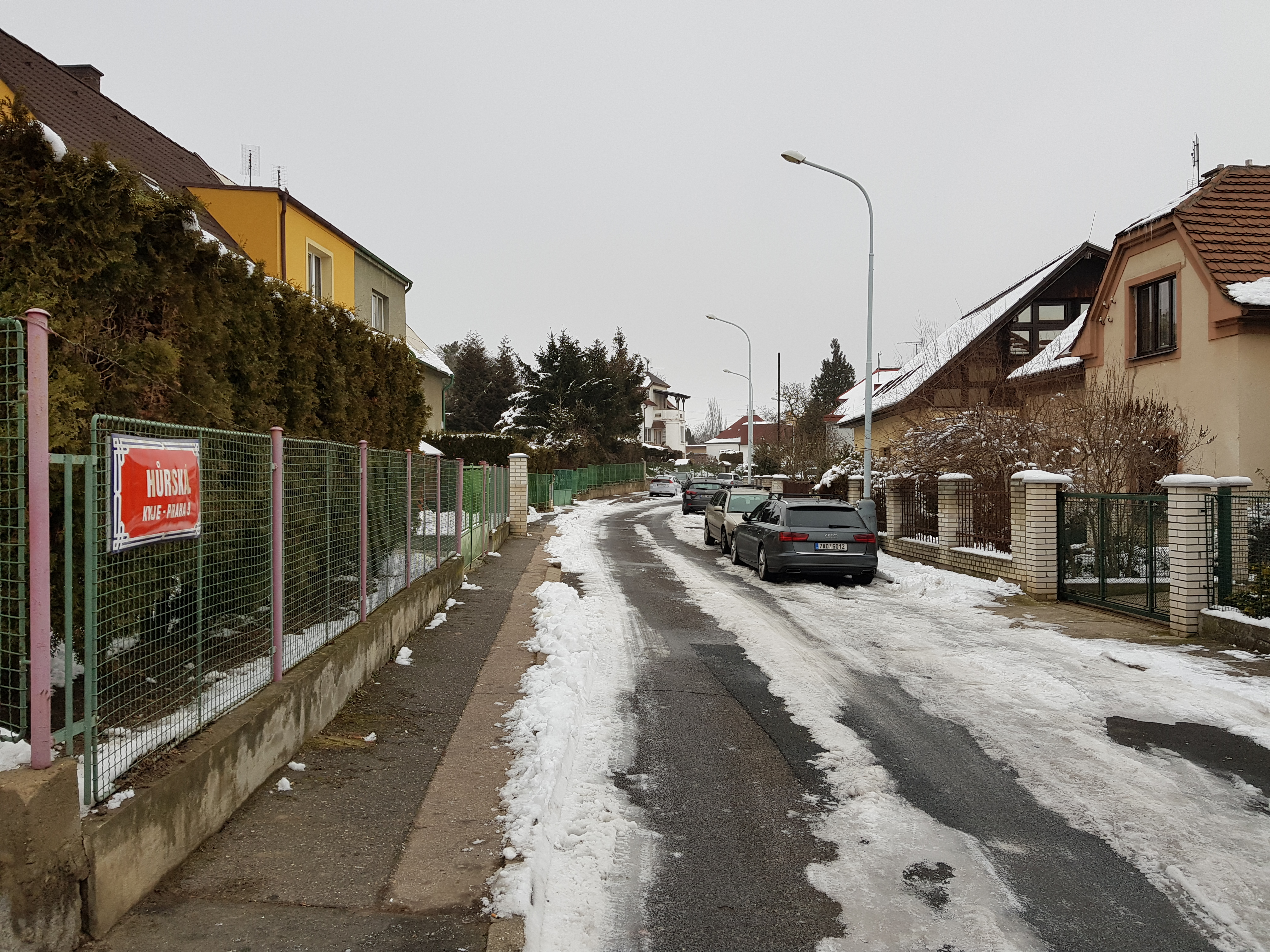 Hůrská ulice, Praha 14, pohled od Metujské severovýchodním směrem na kyjský úsek